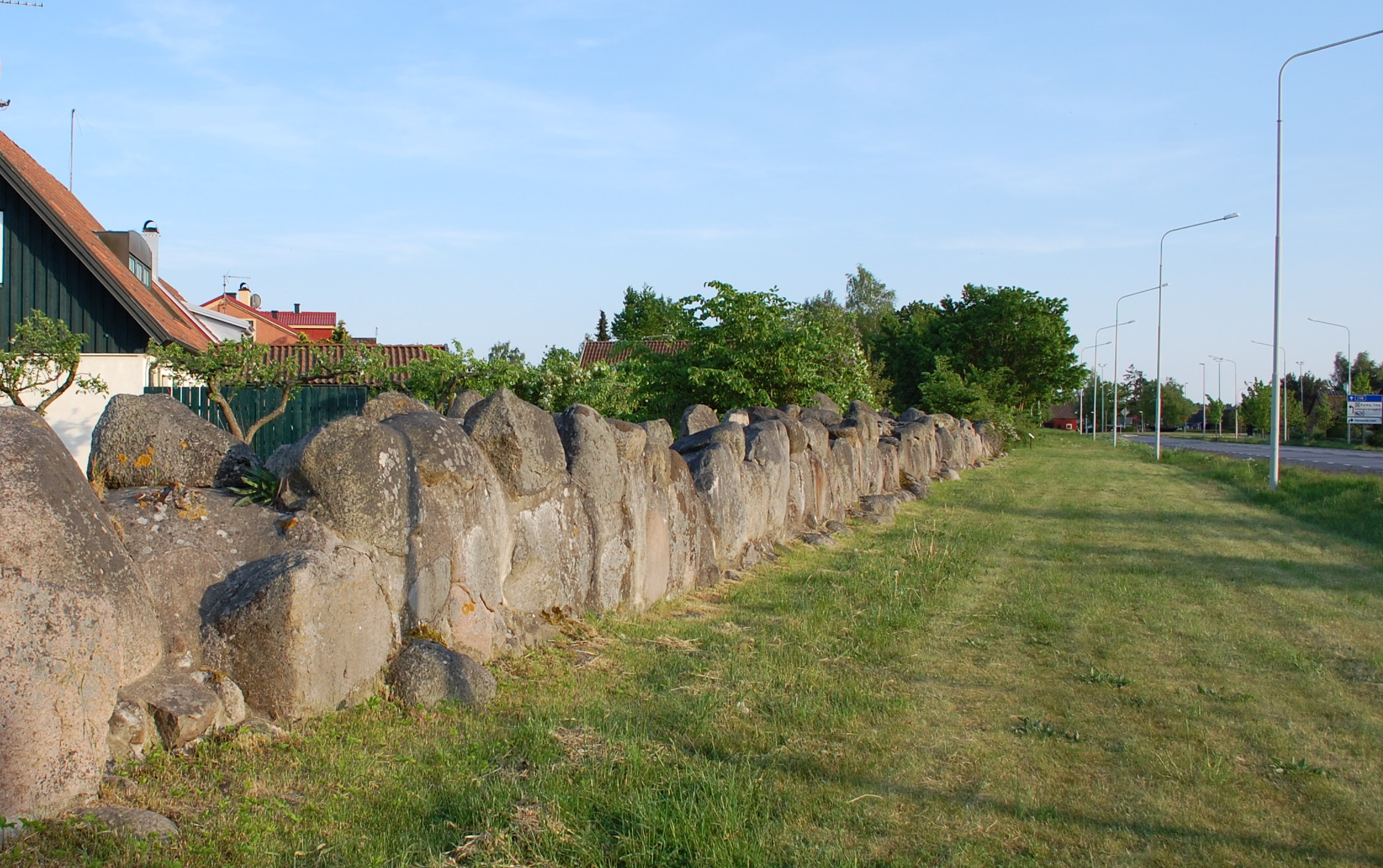 Rest der Stadtmauer von Ahus